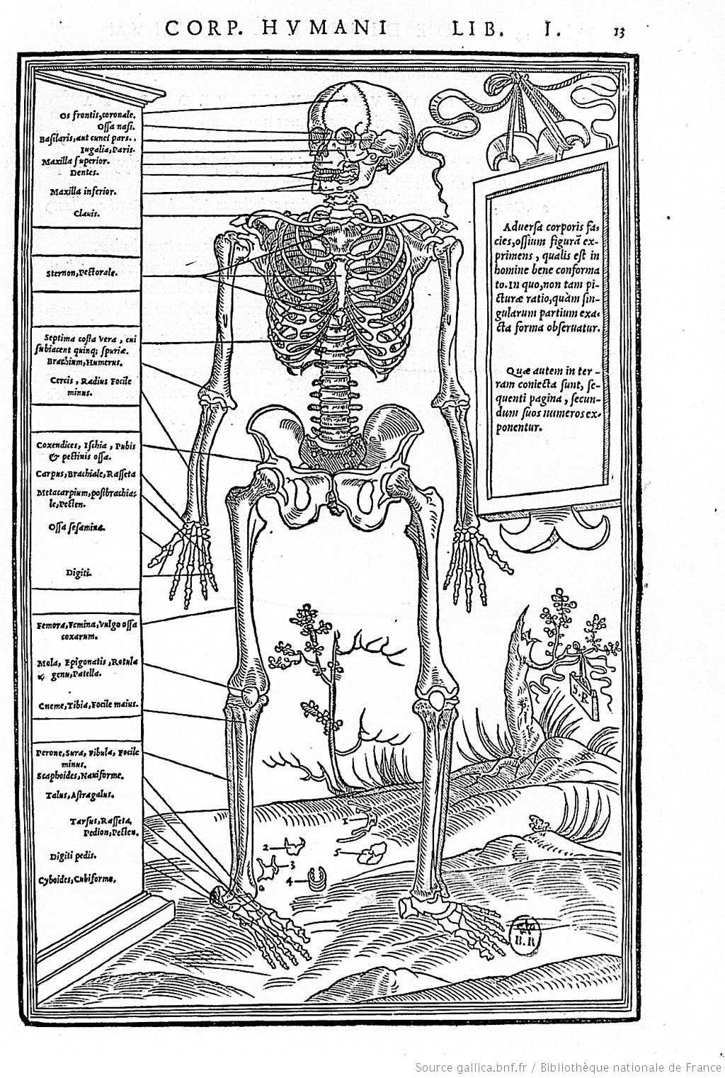 Description du squelette humain extraite de De Dissectione partium corporis écrit par Charles Estienne. Edition en 1545.